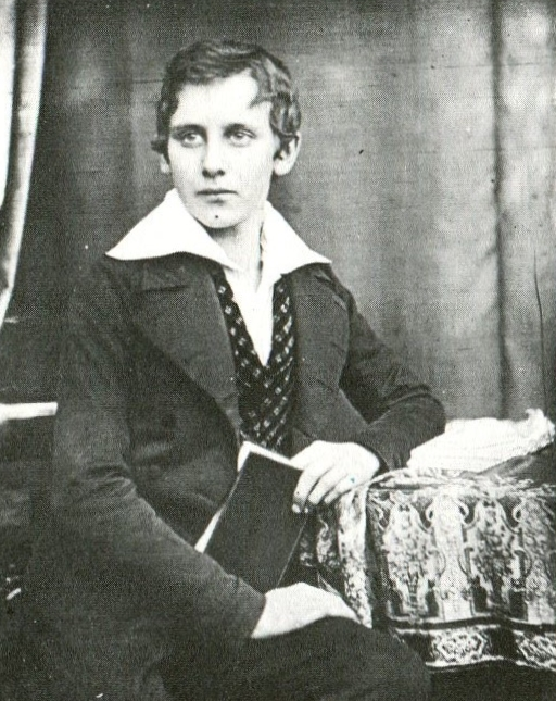 Porträt des späteren Hamburger Senatores Charles Ami de Chapeaurouge